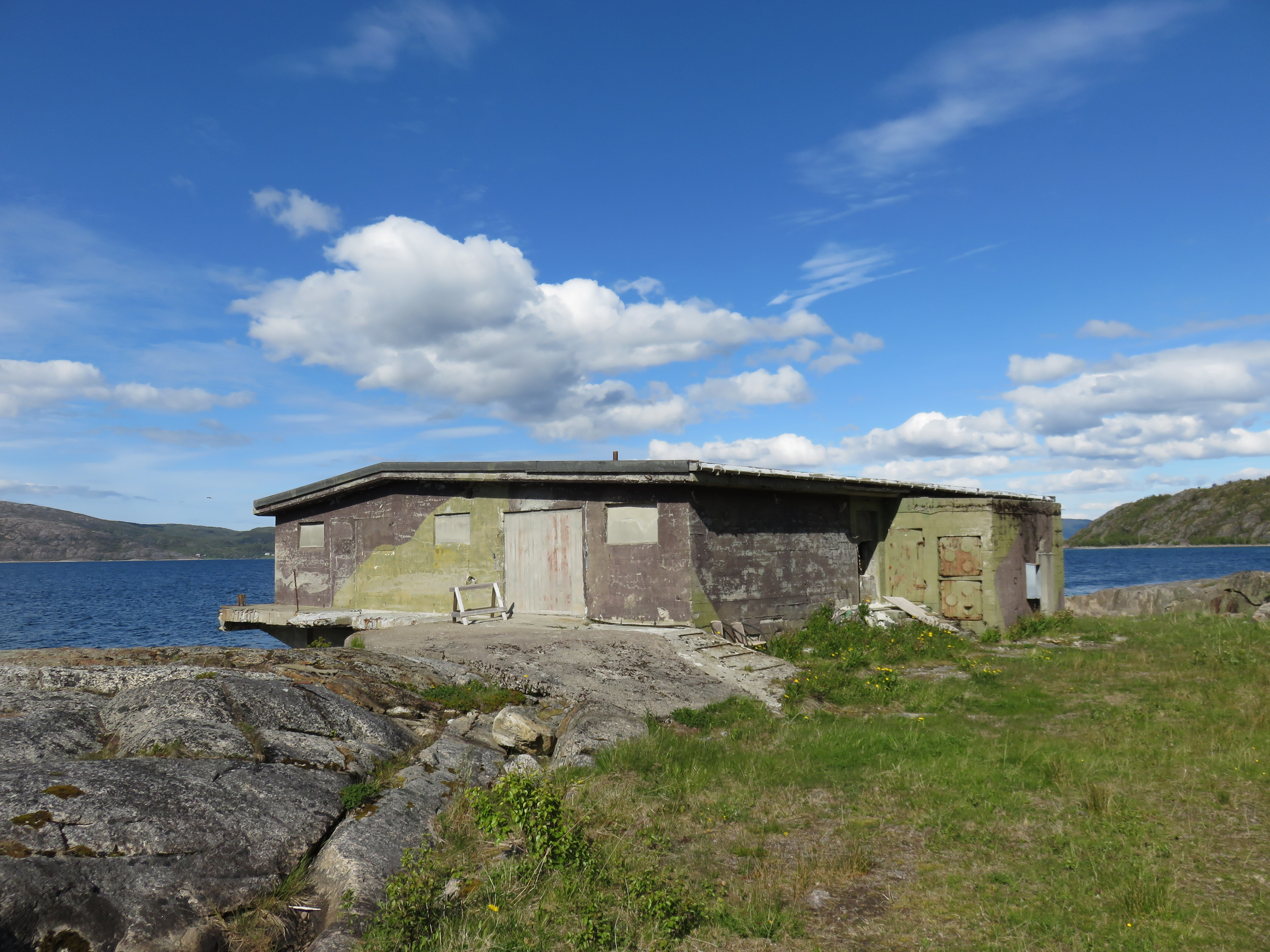 Det nedlagte Korshamn fort ved Kjeldebotn. Tyskbygd kanonstilling.